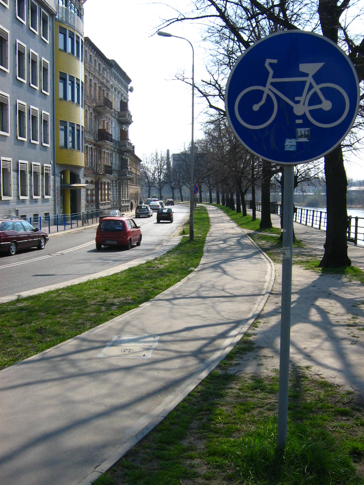 Bicycle path (ścieżka rowerowa), Wybrzeże Wyspiańskiego, Wrocław, Poland